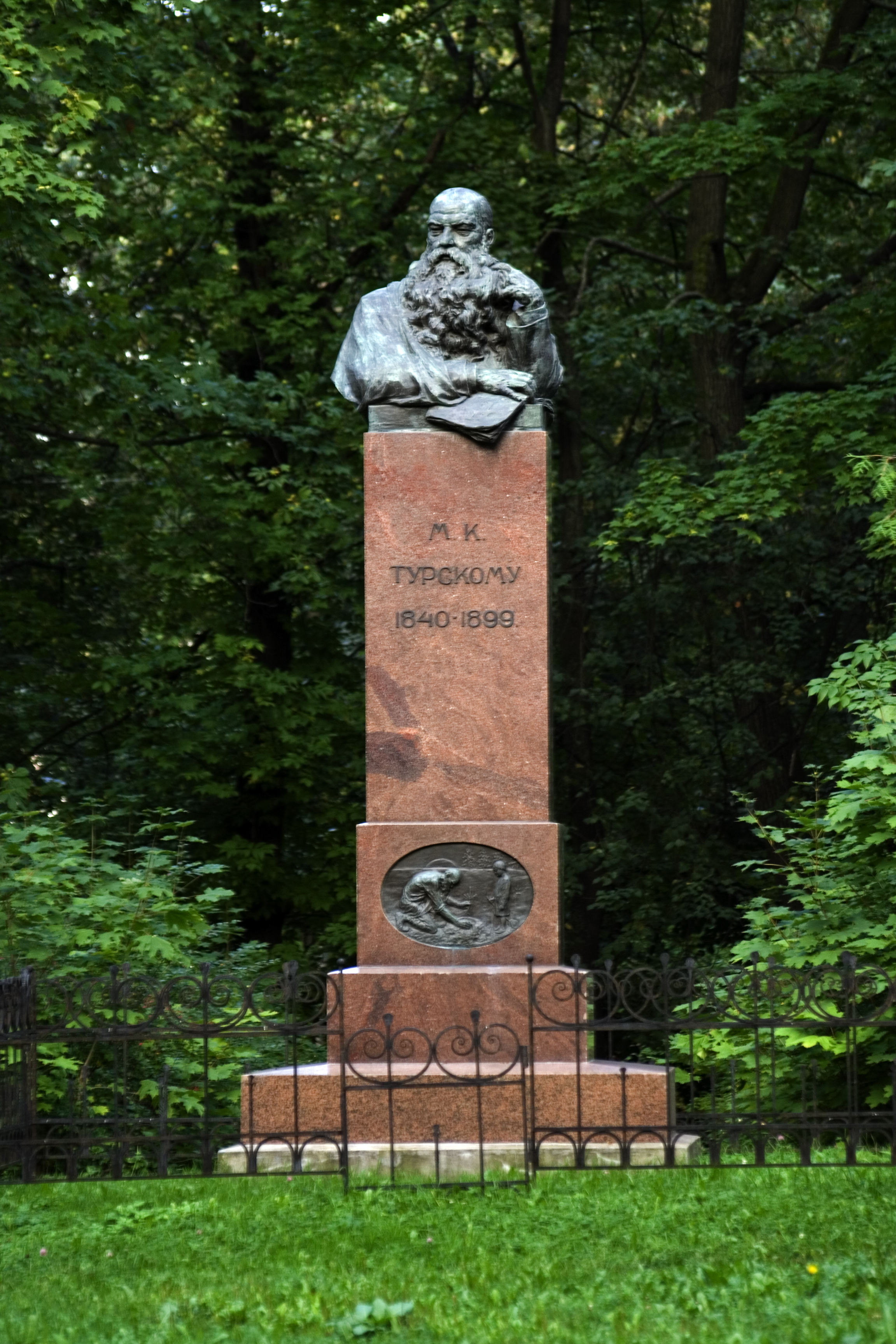 Памятник Турскому в районе Тимирязевской улицы